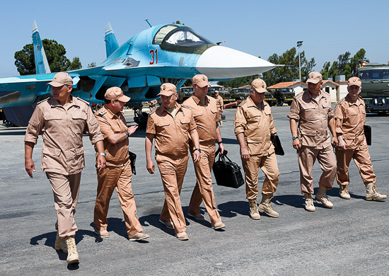 Инспектирование несения российскими военнослужащими боевой службы на авиабазе Хмеймим в Сирии Министром обороны Российской Федерации генералом армии Сергеем Шойгу